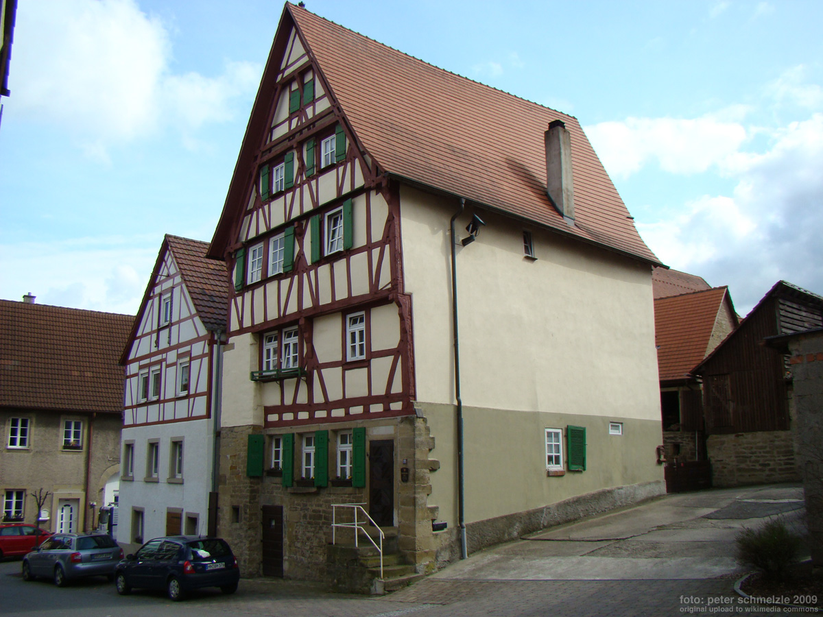 Historisches Gebäude Kirchgasse 22 in Eppingen